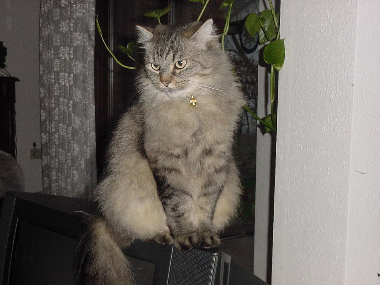 Sibirischer Kater Omega